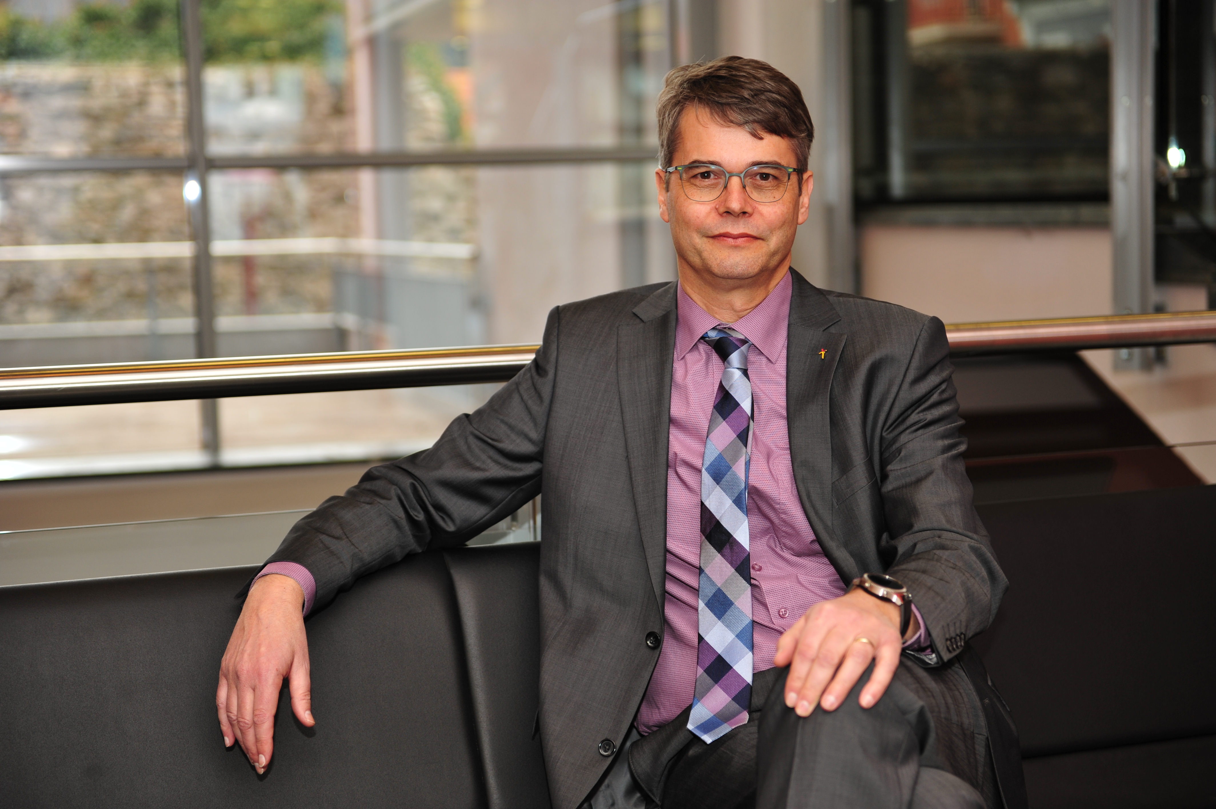 Superintendent der Evangelischen Diözese A.B. seit 2018